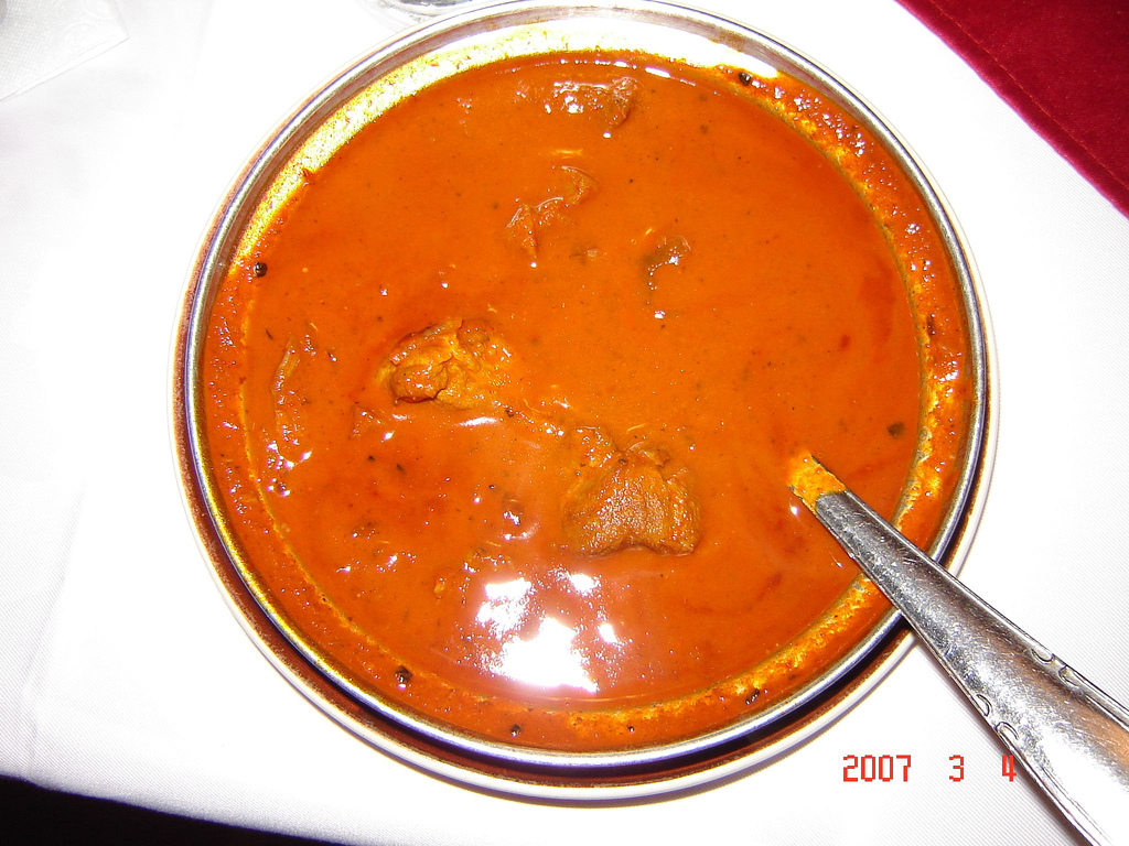 Autore= namit_in_us [1] Fonte= Descrizione= Piatto di Vindaloo cucinato a Goa Licenza=CC BY-2.0 Note=